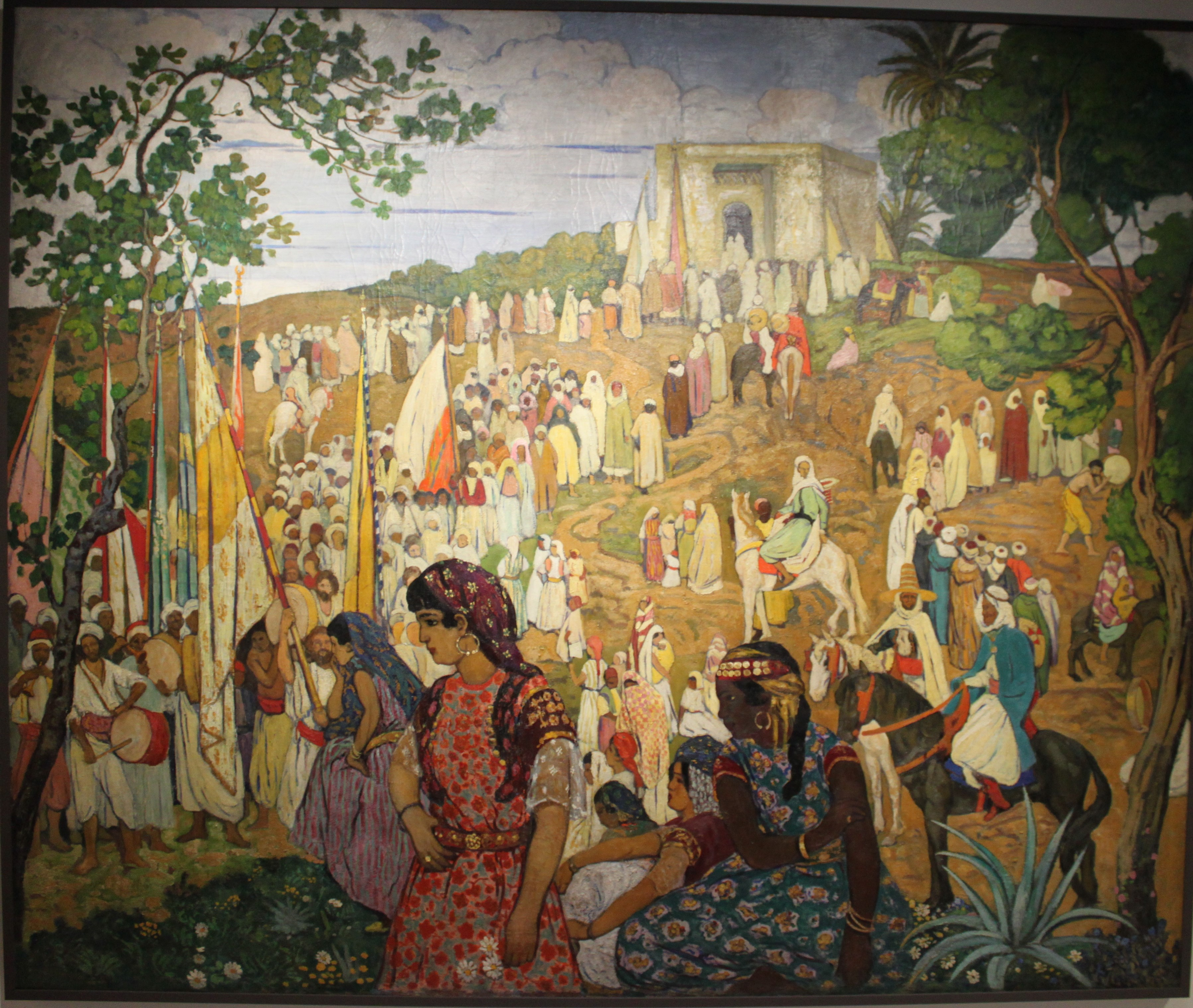 La Fête arabe dans la campagne de Tlemcen (ancien titre : Fête marocaine) - 1910-1920 - André Suréda - Huile sur toile - Musée du quai Branly - Inv. 75.10094.1 - Don de madame André Suréda au Musée de la France d'Outre-mer en 1936. La file de pèlerins se dirige vers le mausolée de Sidi Abdallah Ben Mançour à Aïn el-Hout, localité de la commune de Chetouane.